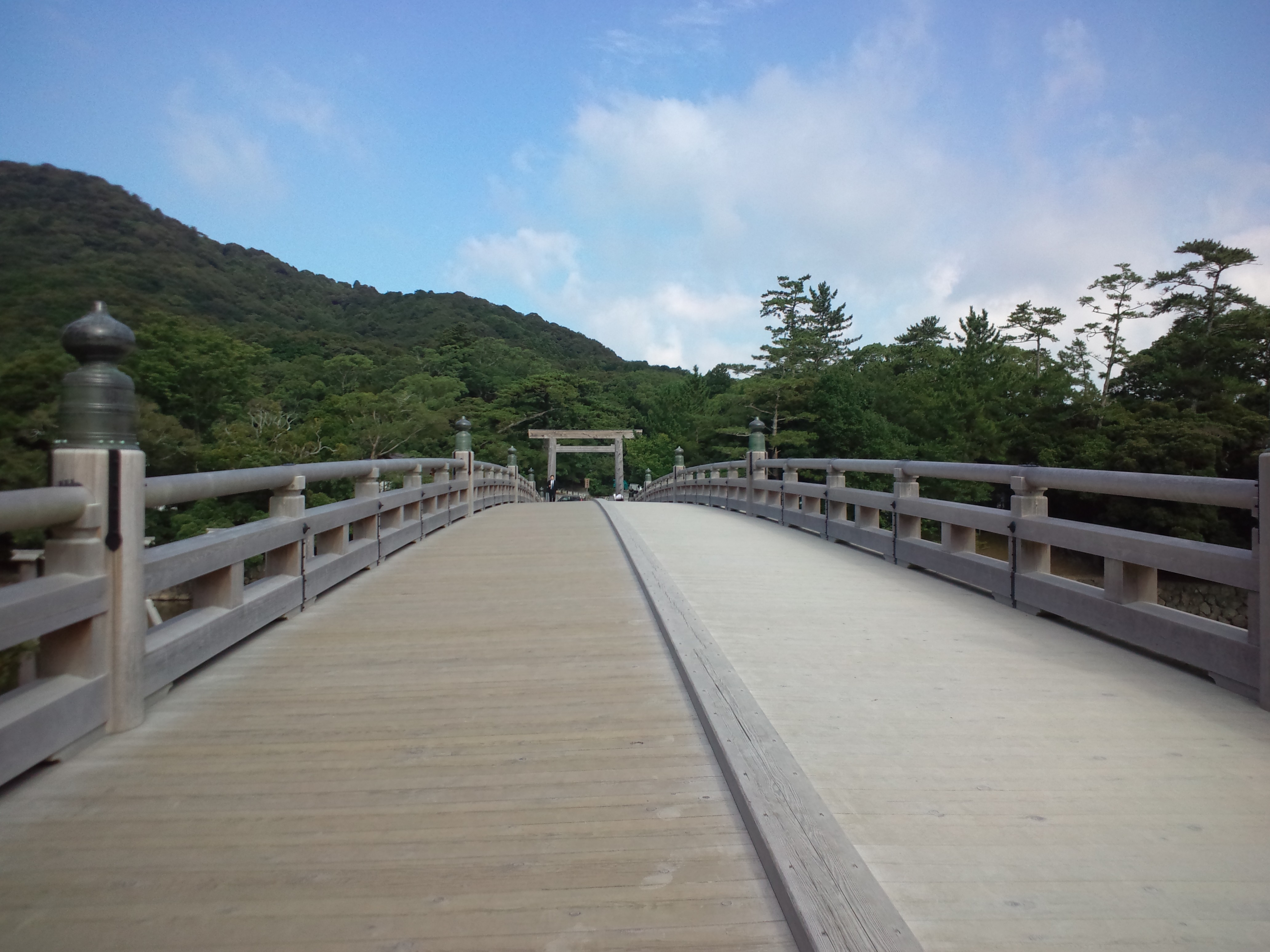 伊勢神宮 宇治橋